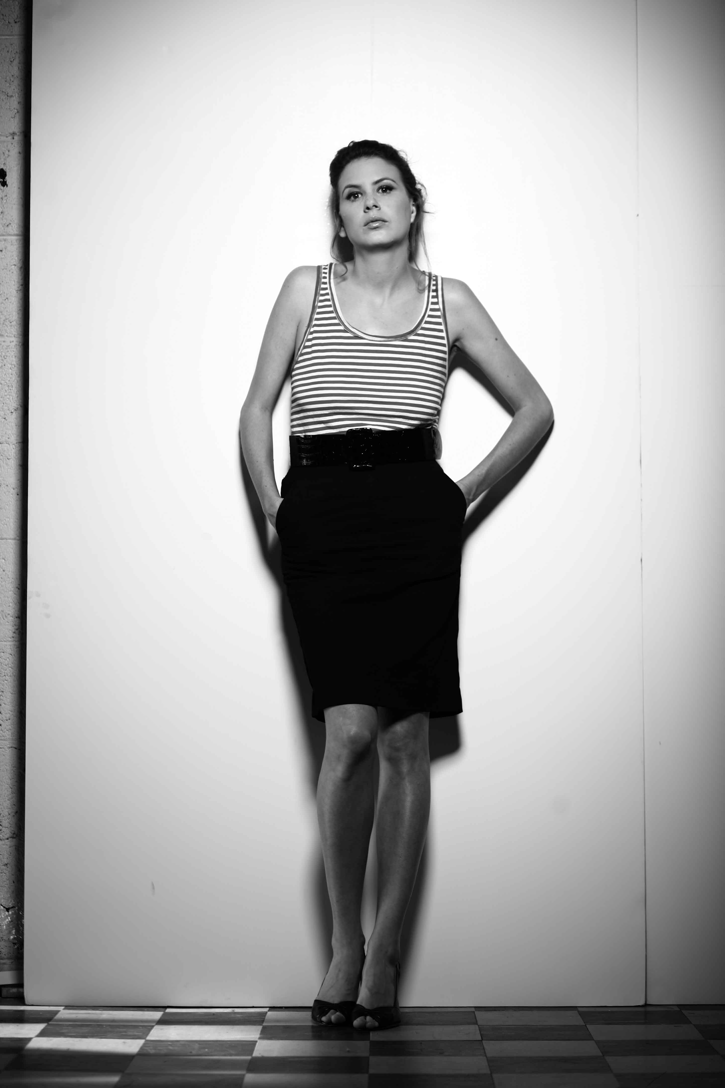 אדוה בולה